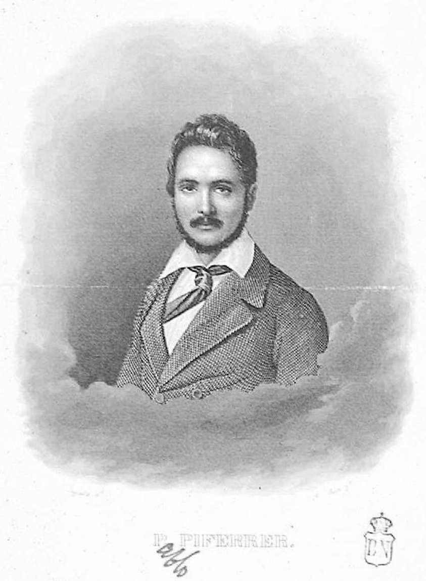 Retrato de Pablo Piferrer y Fábregas por Narciso Inglada, ilustración de sus Composiciones poéticas, Barcelona, 1851